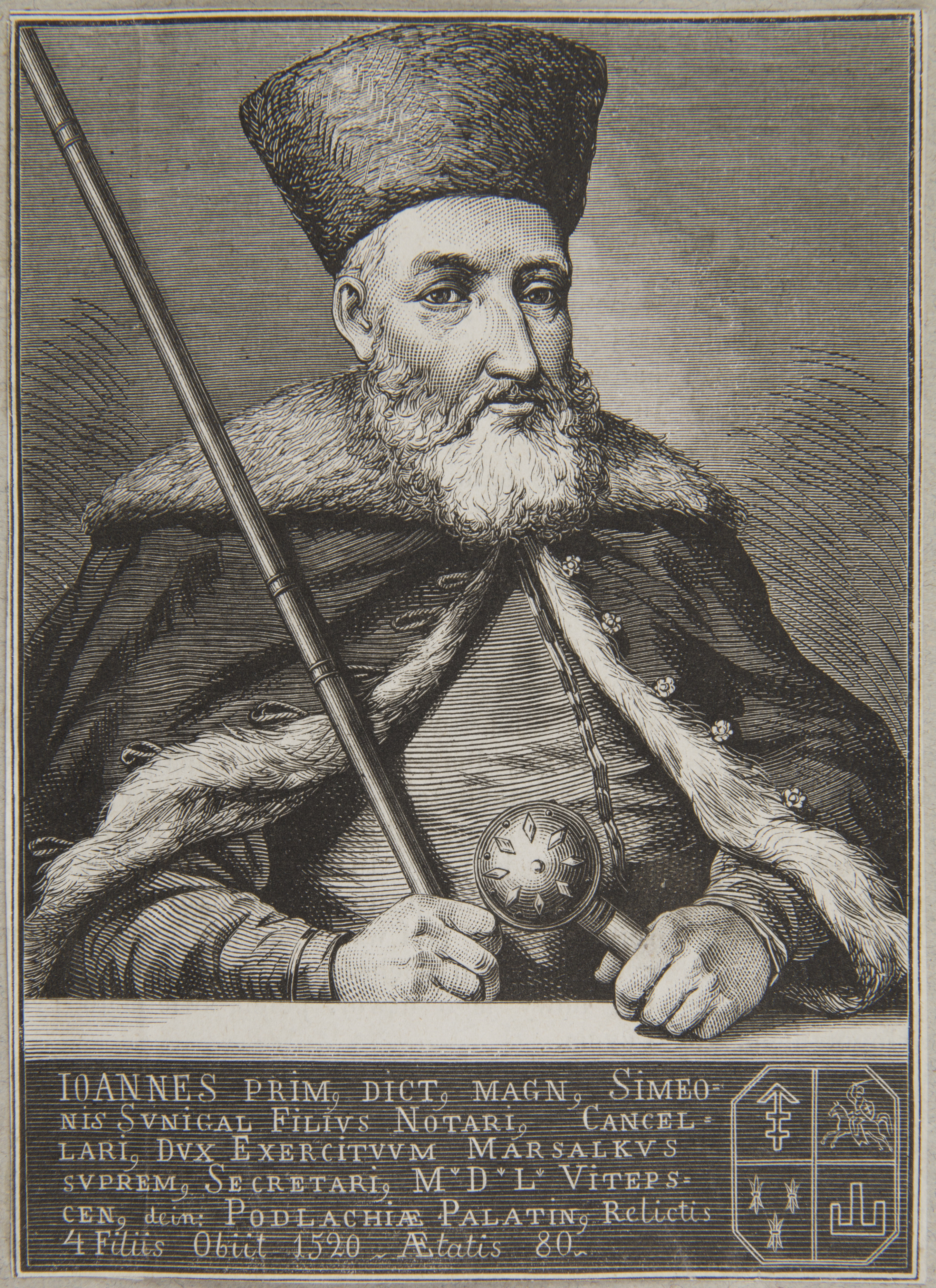 Беларуская (тарашкевіца): Партрэт Івана Сапегі (Ivan Sapieha)